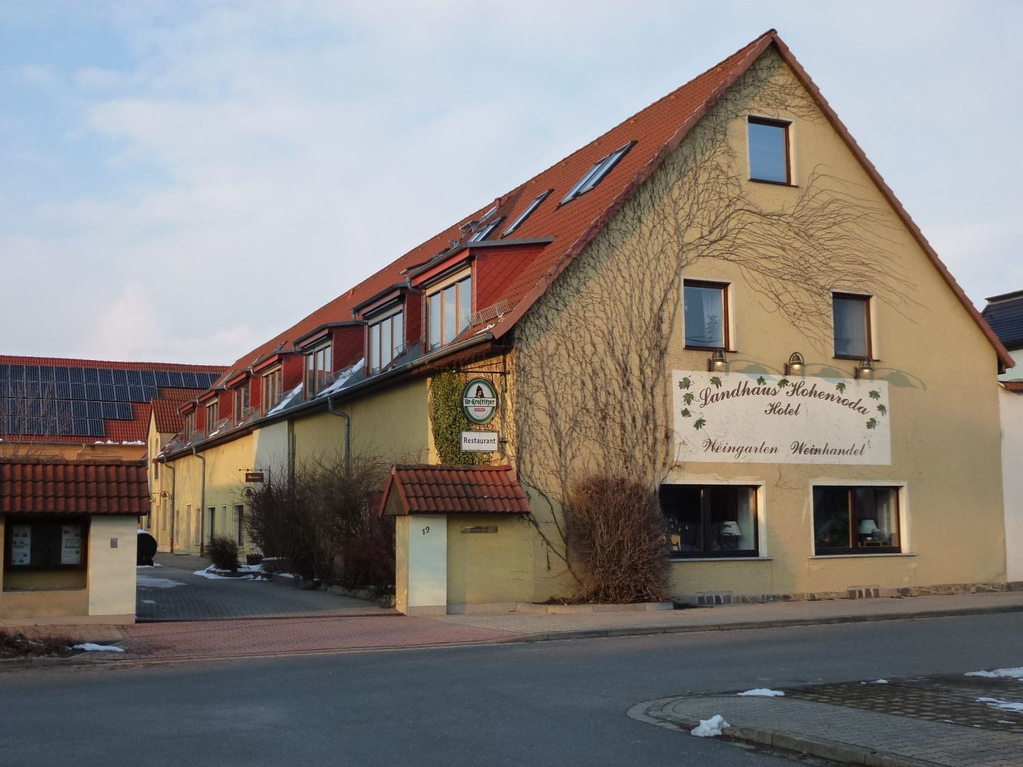 Hotel in Hohenroda